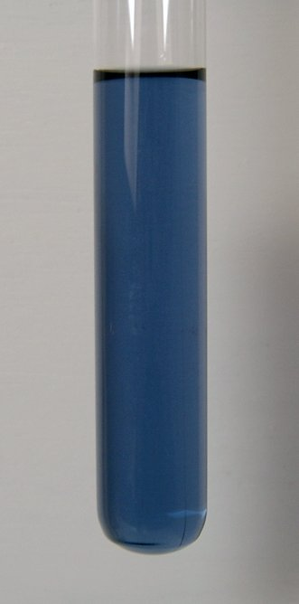 Chrom(III)-sulfatlösung. Die Farbe resultiert aus einen Aquakomplex